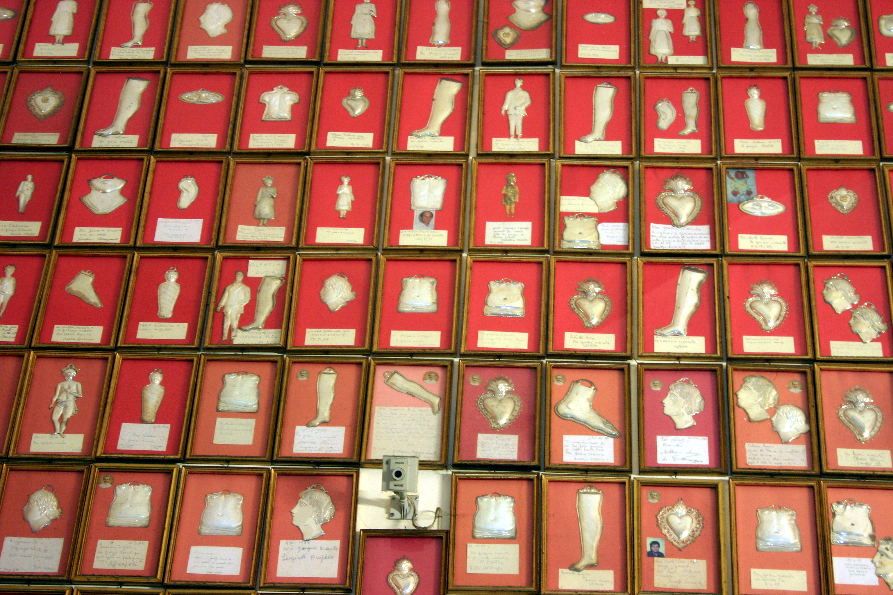 Gesù Nuovo - Naples